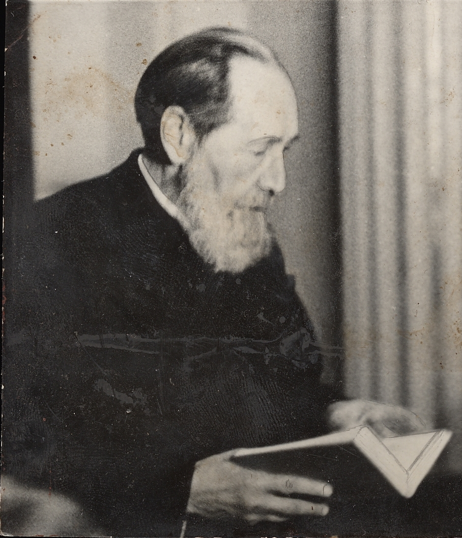 Fotografie a scriitorului român Ion Agârbiceanu din 17 decembrie 1954